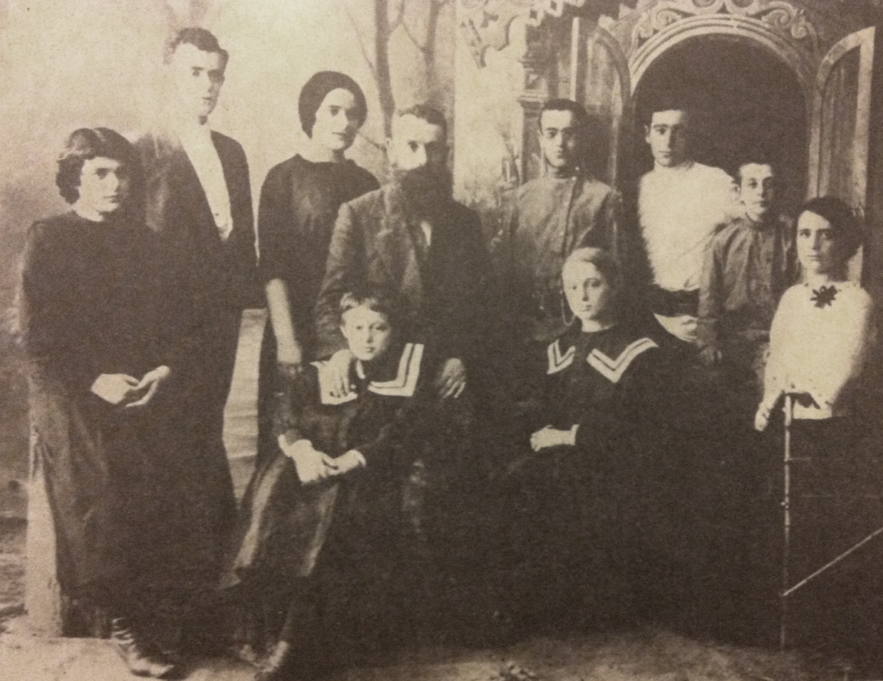 שולמית קליבנוב ומשפחתה.במרכז האב ראובן, שולמית נשענת עליו וידו על כתפה.